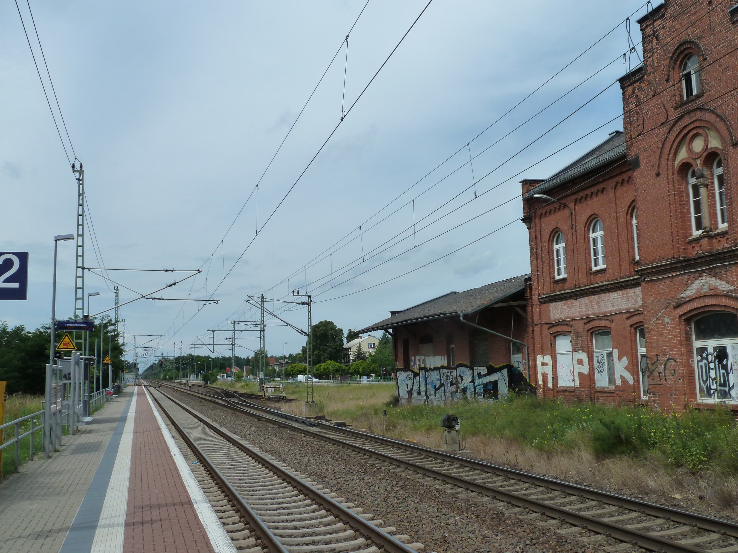 Bahnhof Wusterwitz,Bahnsteige, im Vordergrund in Richtung Berlin, im Hintergrund in Richtung Magdeburg